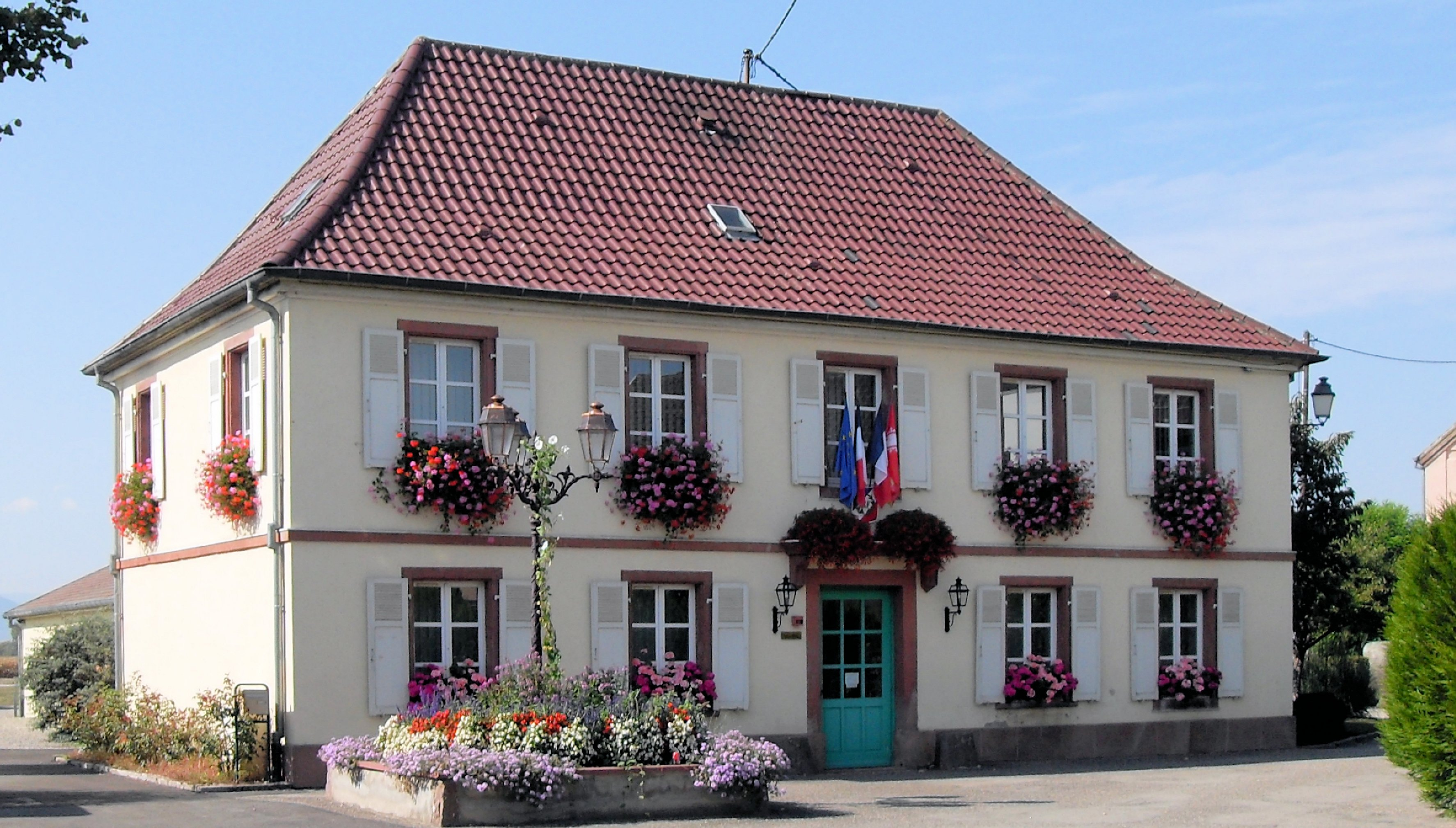 La mairie de Fortschwihr